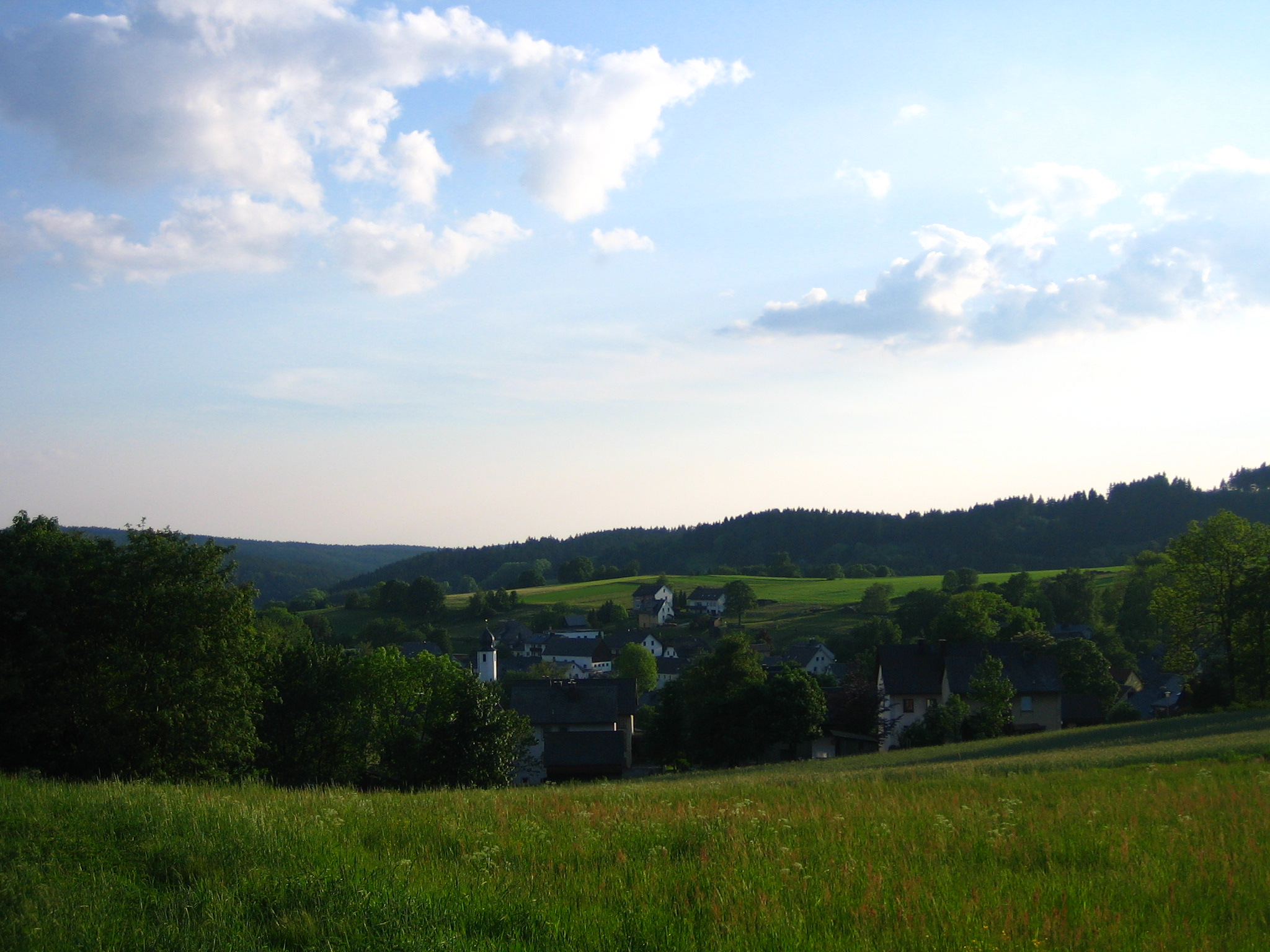 Langenbach im Sommer